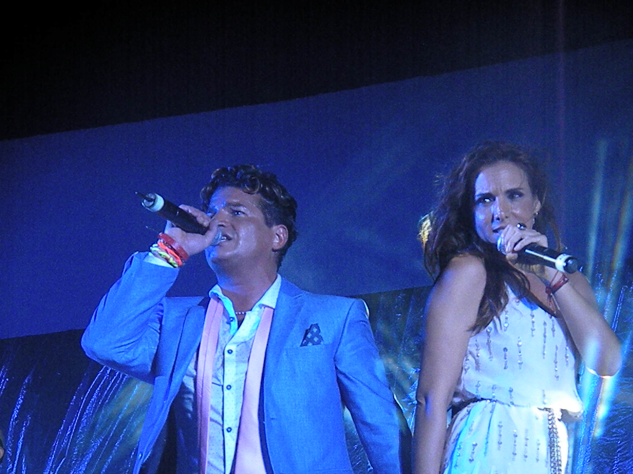 Concierto Juntos en Cancún, Marzo 19 de 2016.